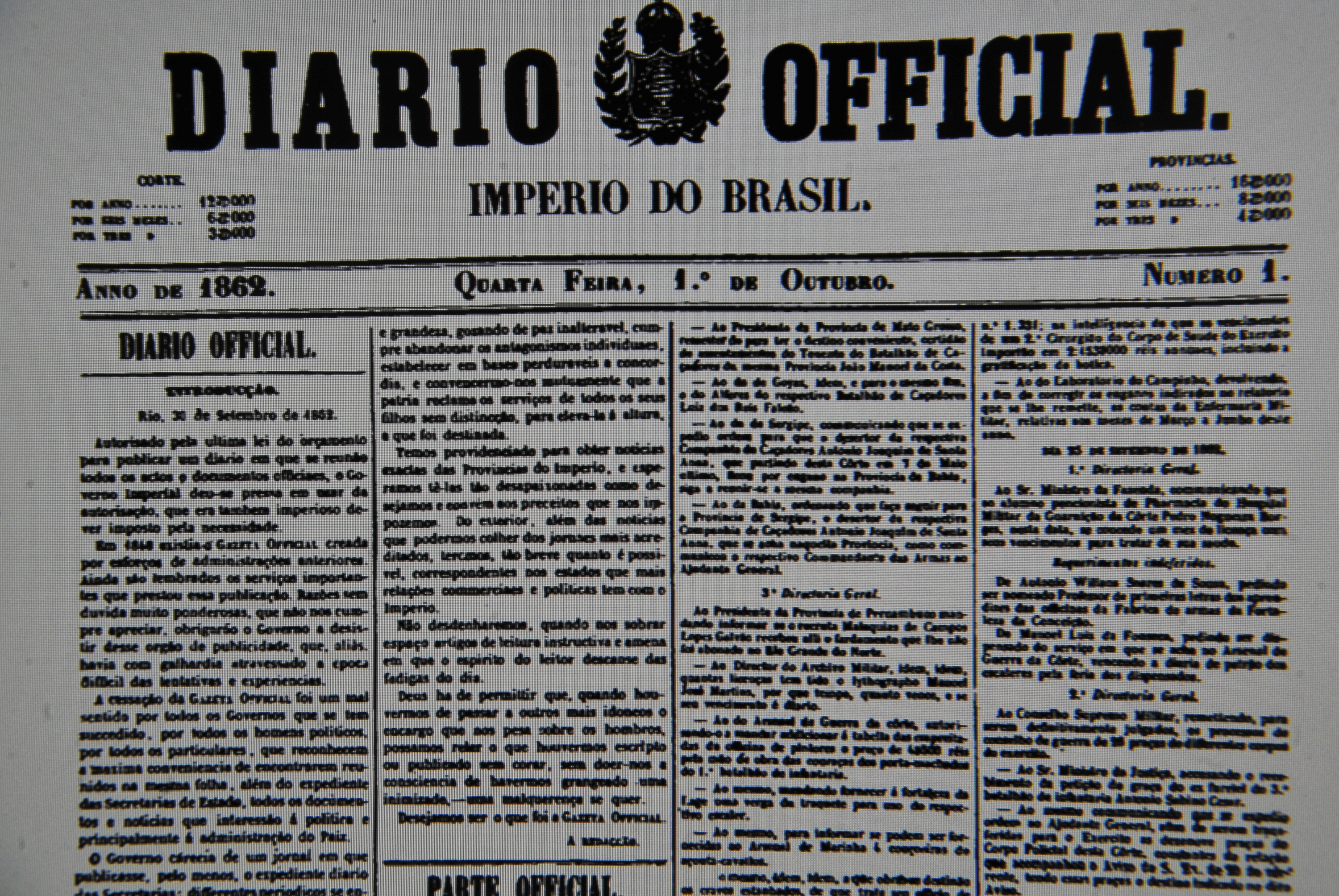 A primeira edição do Diário Oficial da União do Brasil, publicada em 1 de outubro de 1862.